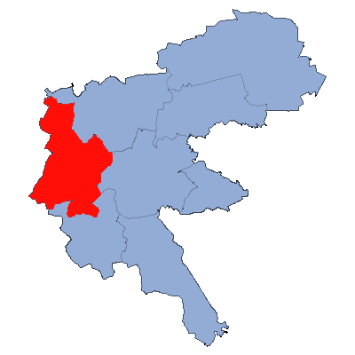 Gmina Pietrowice Wielkie w powiecie raciborskim-mapka